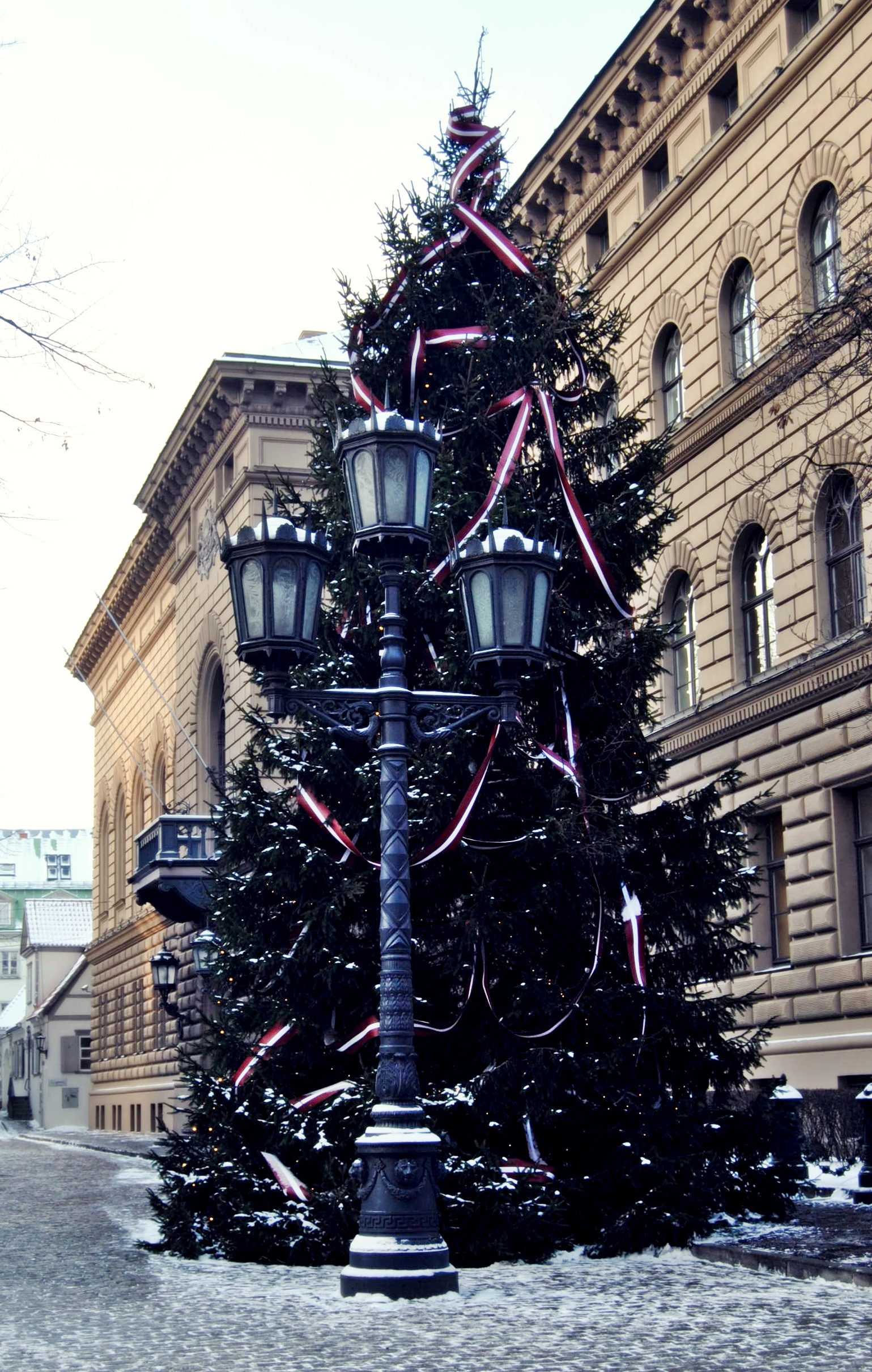 Ceturtdien, 2.decembrī, pie Saeimas nama iedegta Ziemassvētku eglīte. Foto: Saeimas Kanceleja